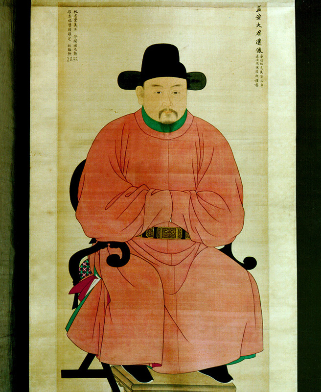 익안대군영정 (益安大君影幀), 충청남도 문화재자료 제329호